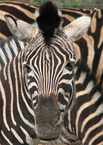 Chapman-Zebra im Tierpark Berlin